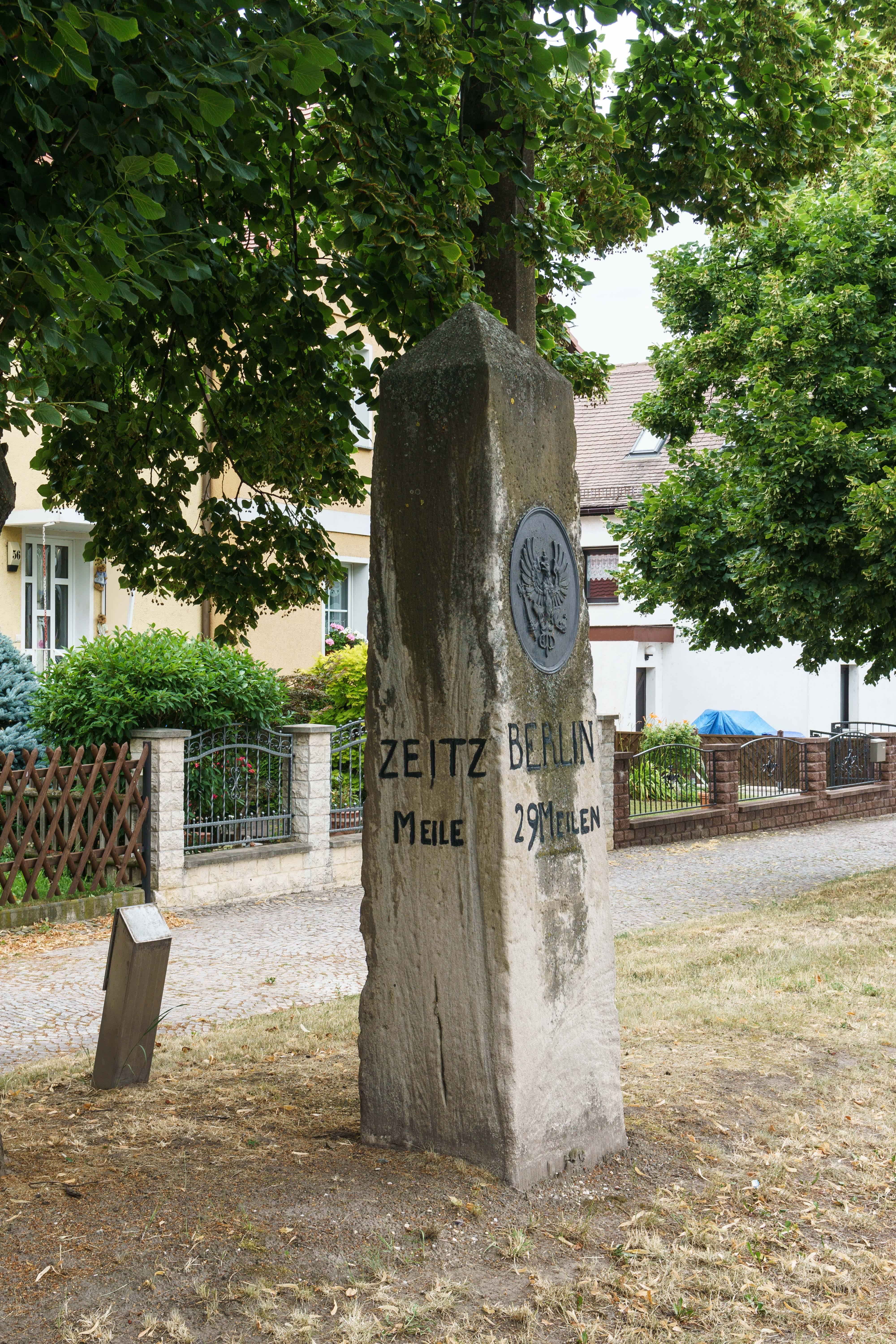 Preußischer Ganzmeilenobelisk (0830) in Zeitz Inschrift: Berlin 29 Meilen ; Weissenfels 2 Meilen